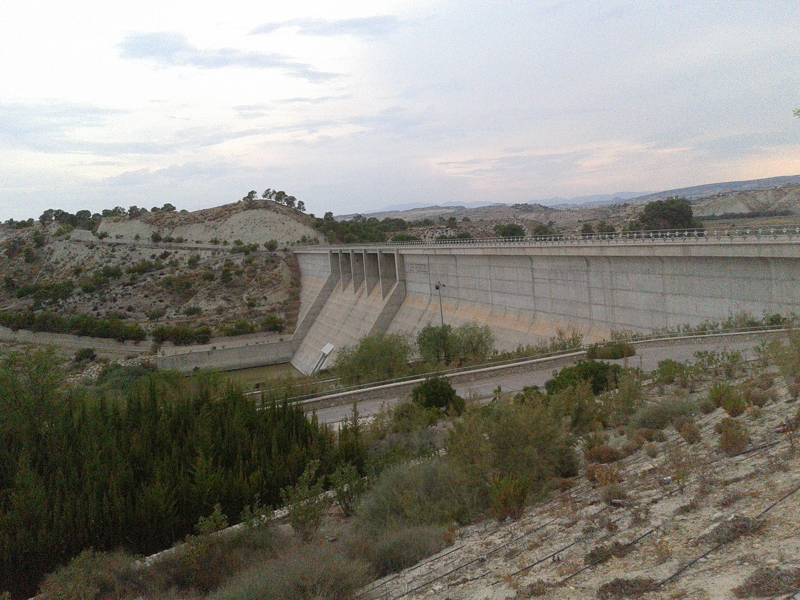 Presa correspondiente a los municipios de Las Torres de Cotillas, Alguazas y Campos del Río.